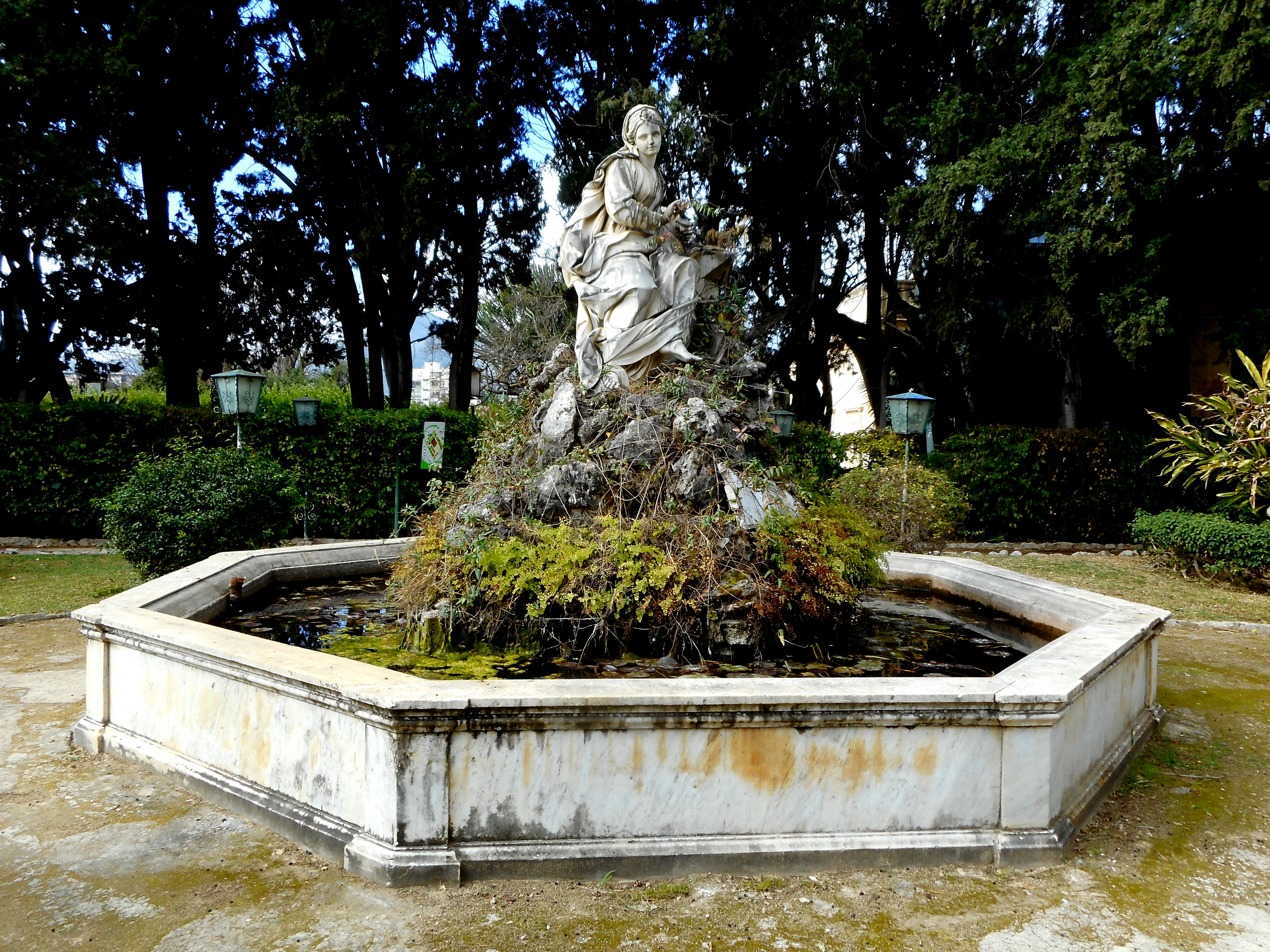 Fontana della Musica nel giardino di Villa Castelnuovo a Palermo